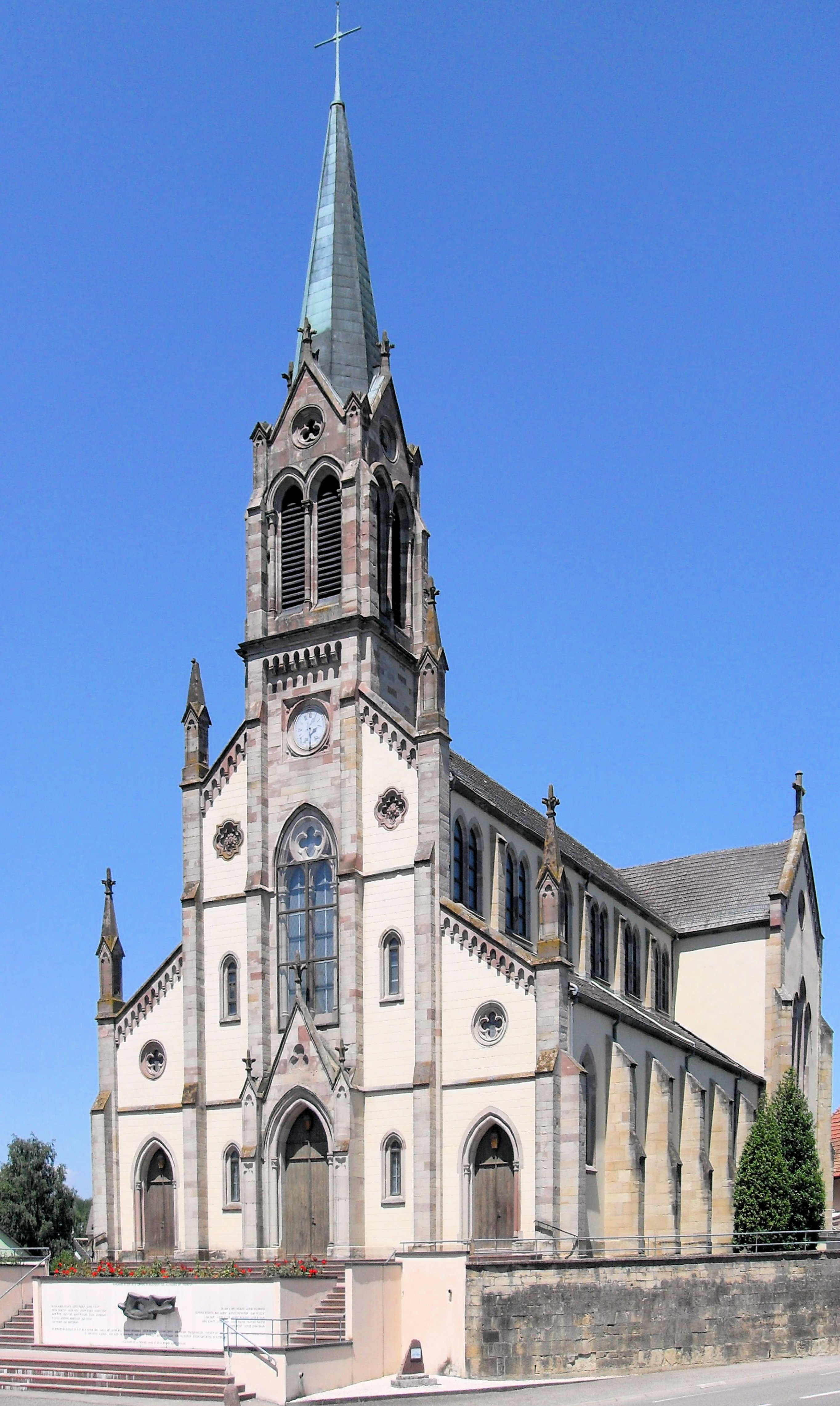 L'église Saint-Jean-l'Evangéliste à Ballersdorf